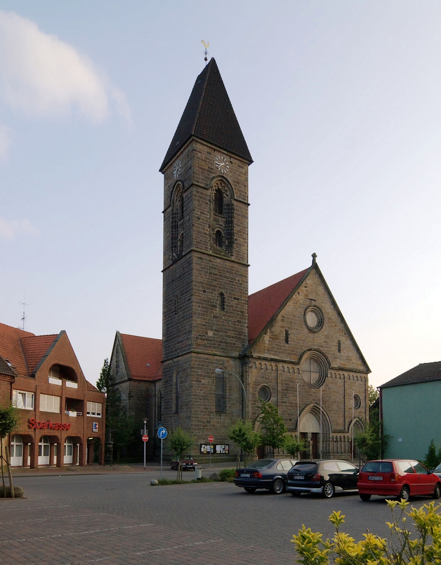 St. Stephanus in Hamm Bockum-Hövel